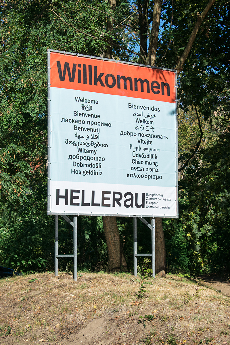 Das Bild zeigt das aktuelle Begrüßungsbanner des Europäischen Zentrums der Künste.